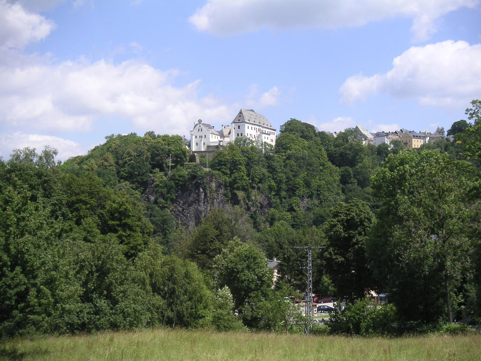 Burg und Ort Wolkenstein/Erzgebirge